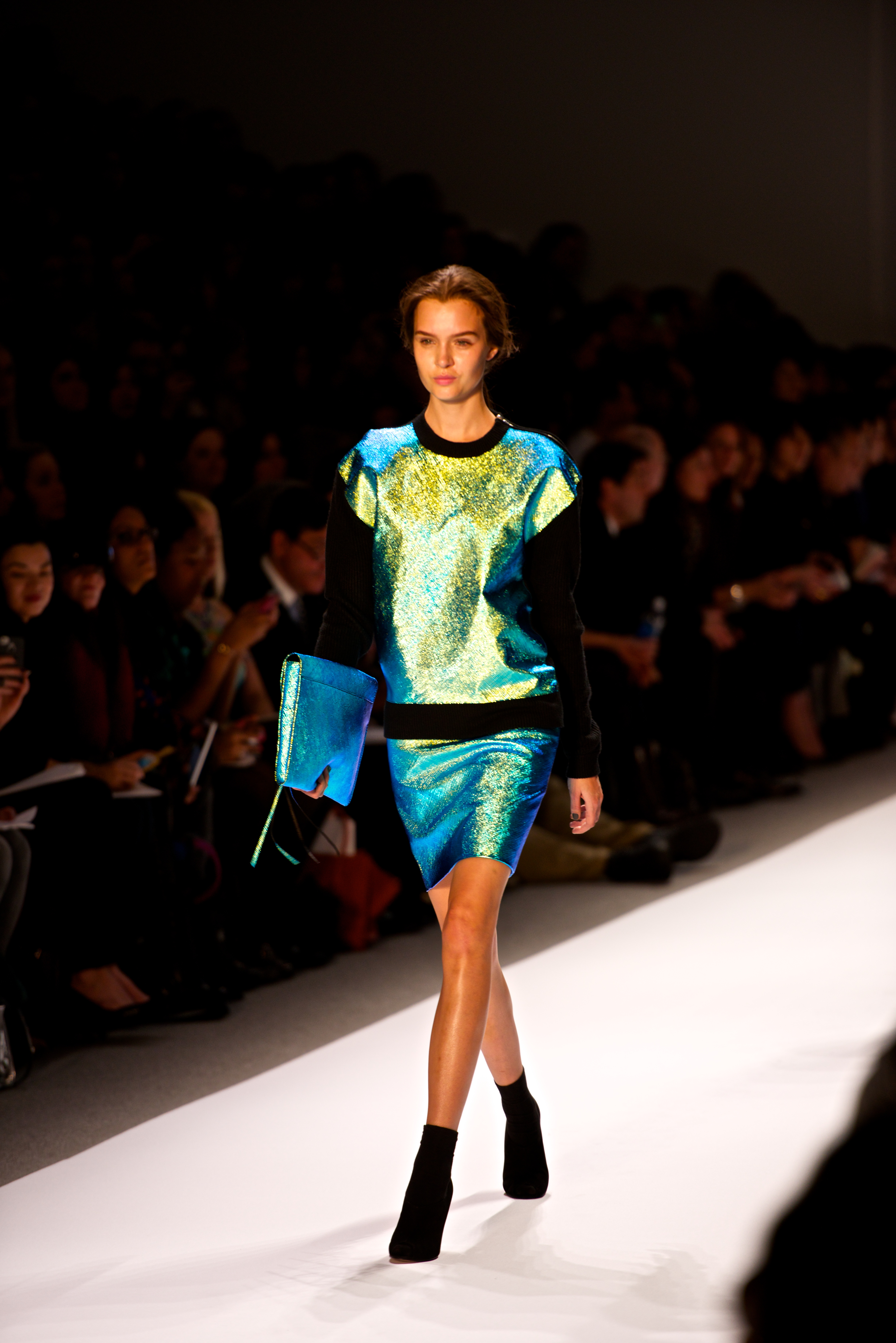 Josephine Skriver défilant lors de la semaine des défilés de New York.